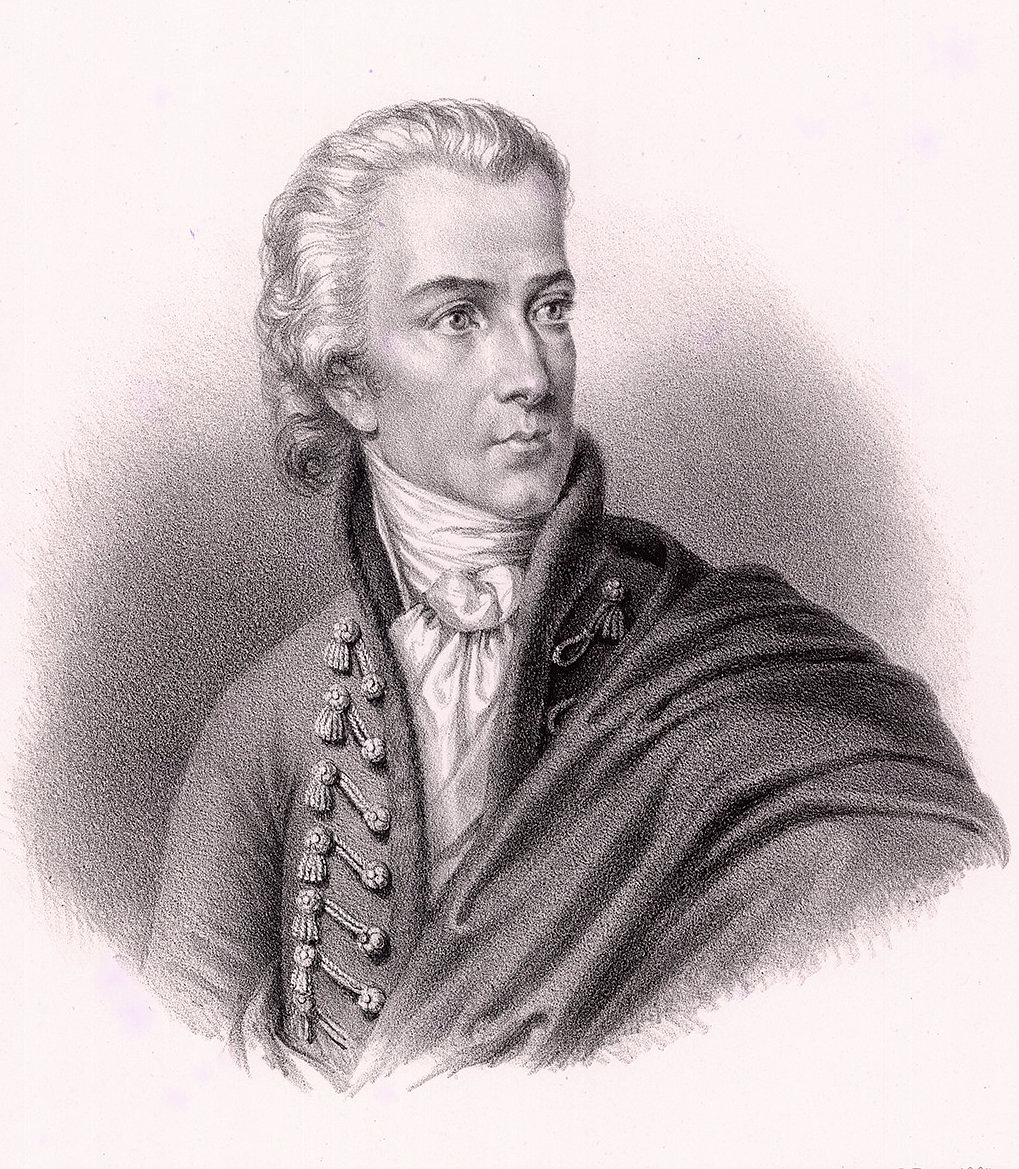 Kazinczi és alsóregmeczi Kazinczy Ferenc (Érsemjén, 1759. október 27. – Széphalom, 1831. augusztus 22.), magyar író, költő, a nyelvújítás vezéralakja, a Magyar Tudományos Akadémia tagja.